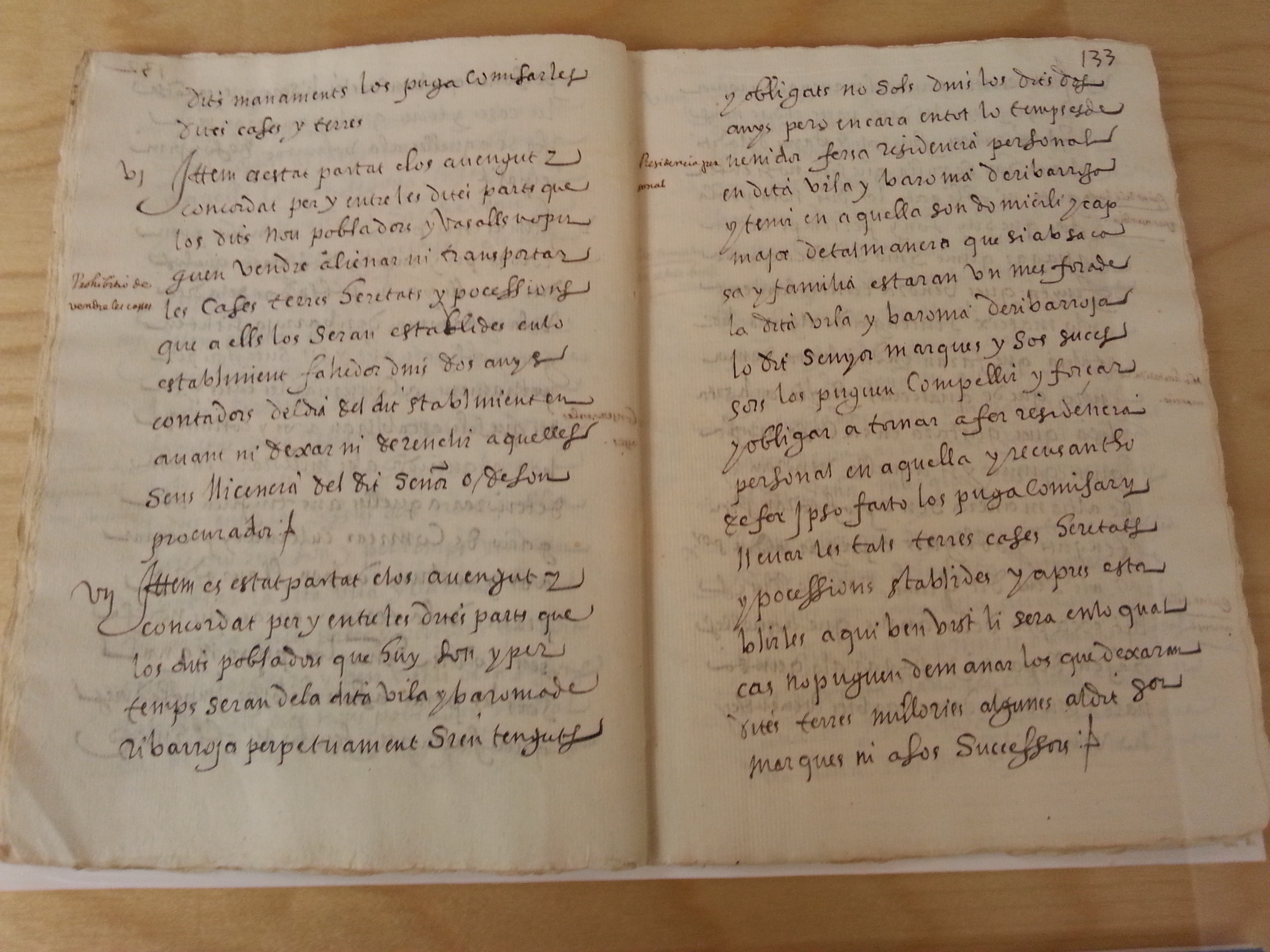 Pere Vila, como a procurador de Sanç Ruiz de Lihori, concedeix nova carta pobla a la baronia de Riba-roja (7 d'agost de 1611). Arxiu del Regne de València. ARVː Reial Audiència, Processos, part 2ª, lletra M, expedient 1333, fol. 115.